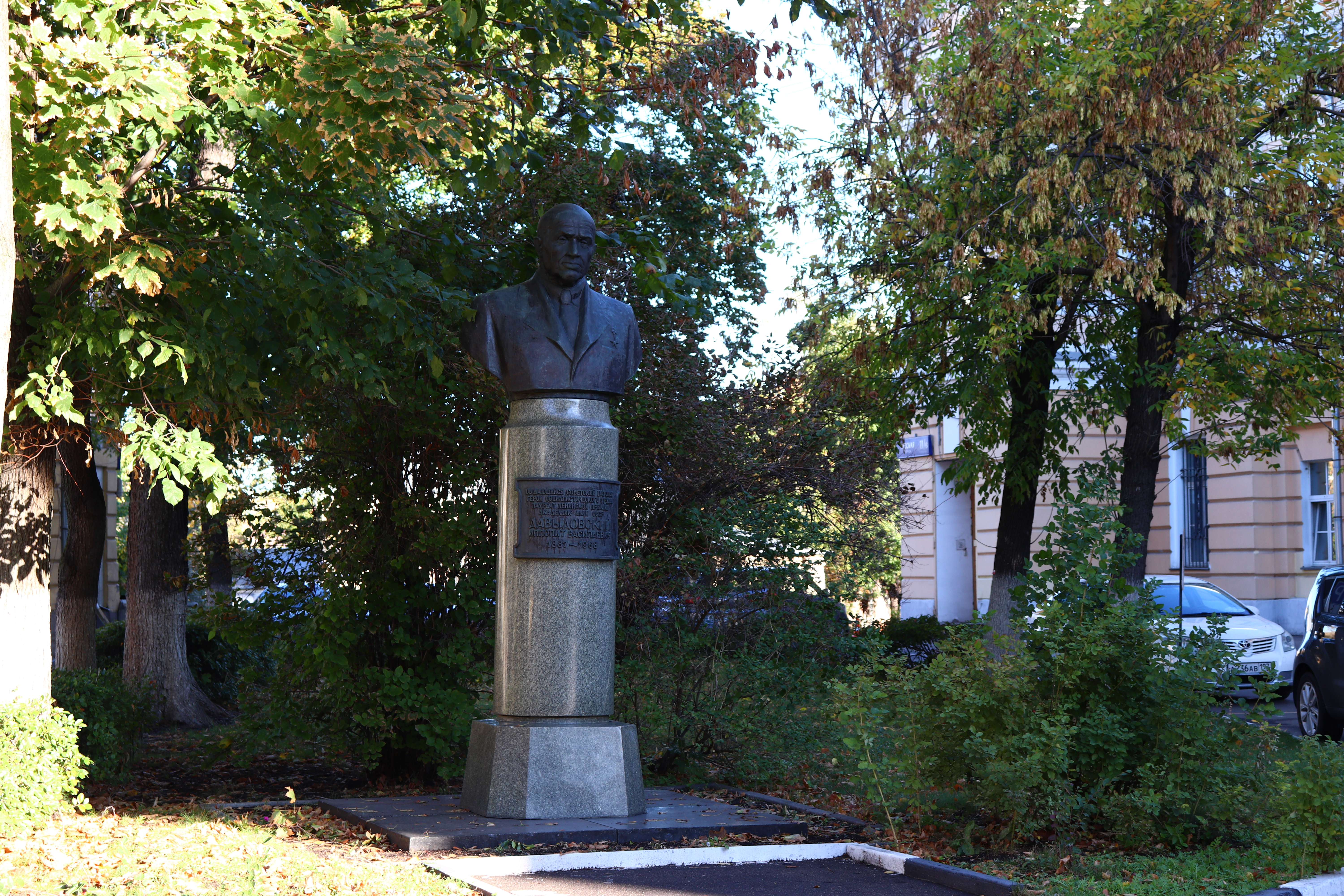 Памятник И.В.Давыдовскому (бюст): Яузская ул., дом.11, Таганский, Центральный округ, Москва